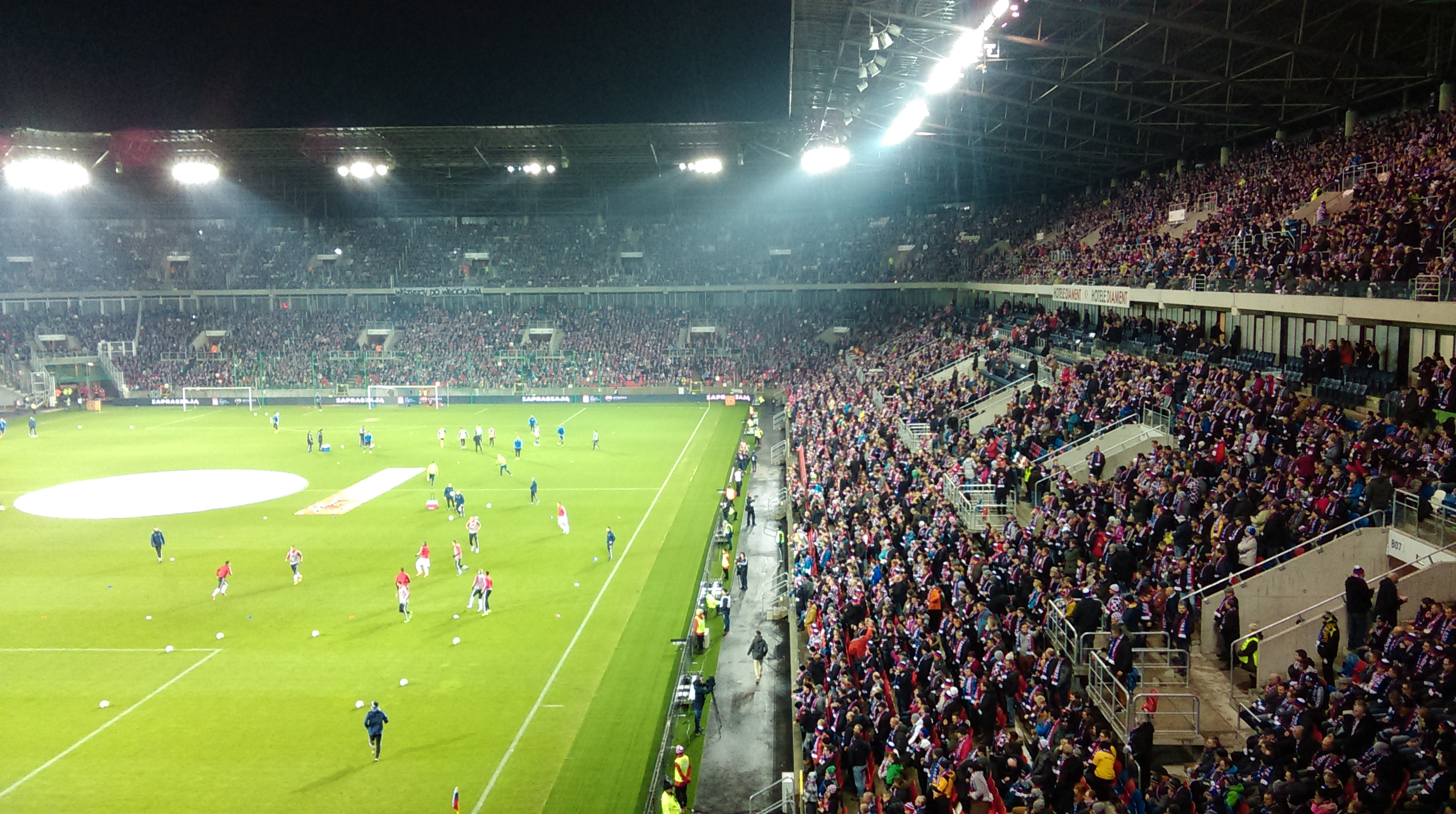 Górnik Zabrze Stadium